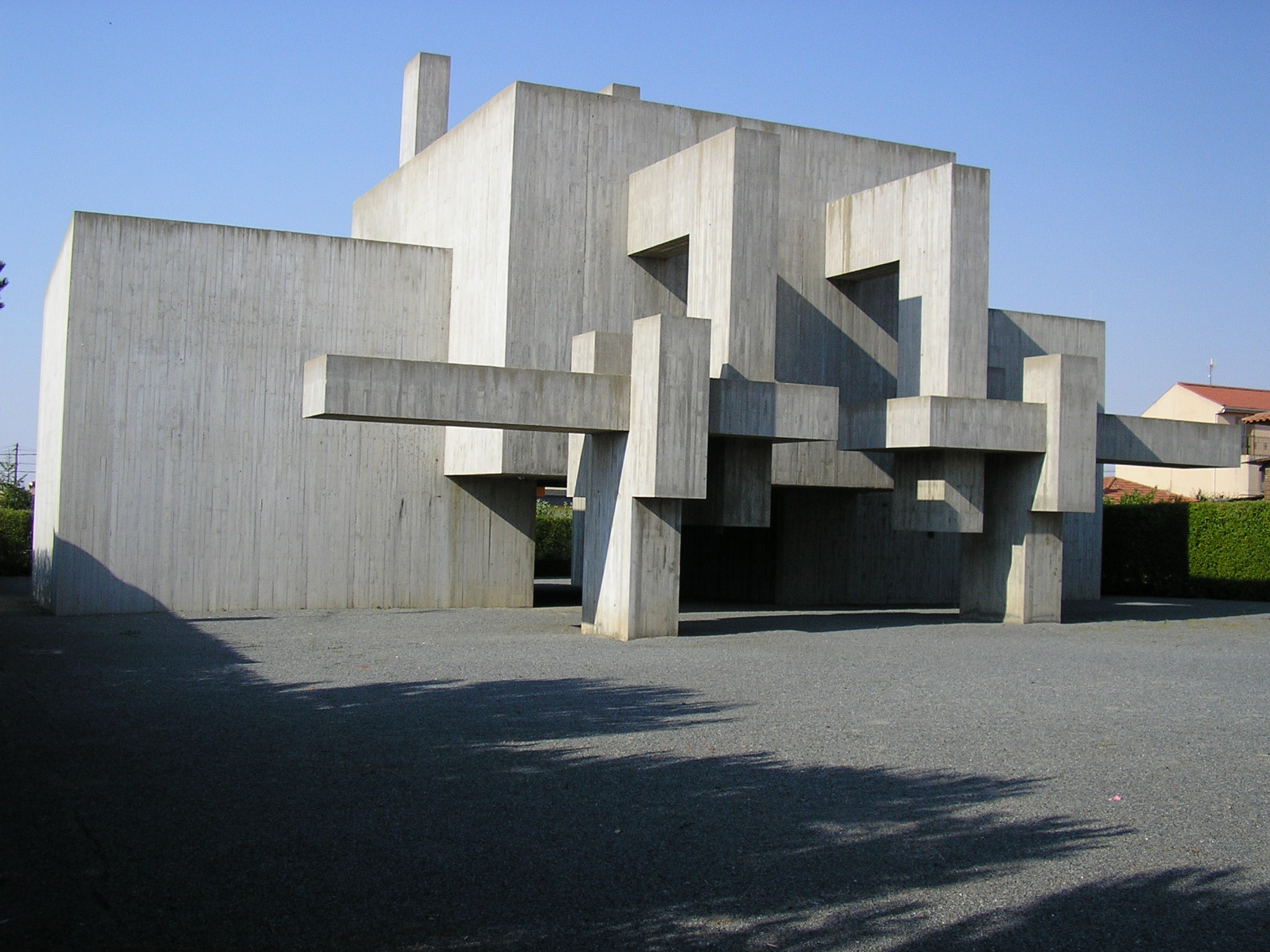 Museo del Hormigón Ángel Mateos - Escultura